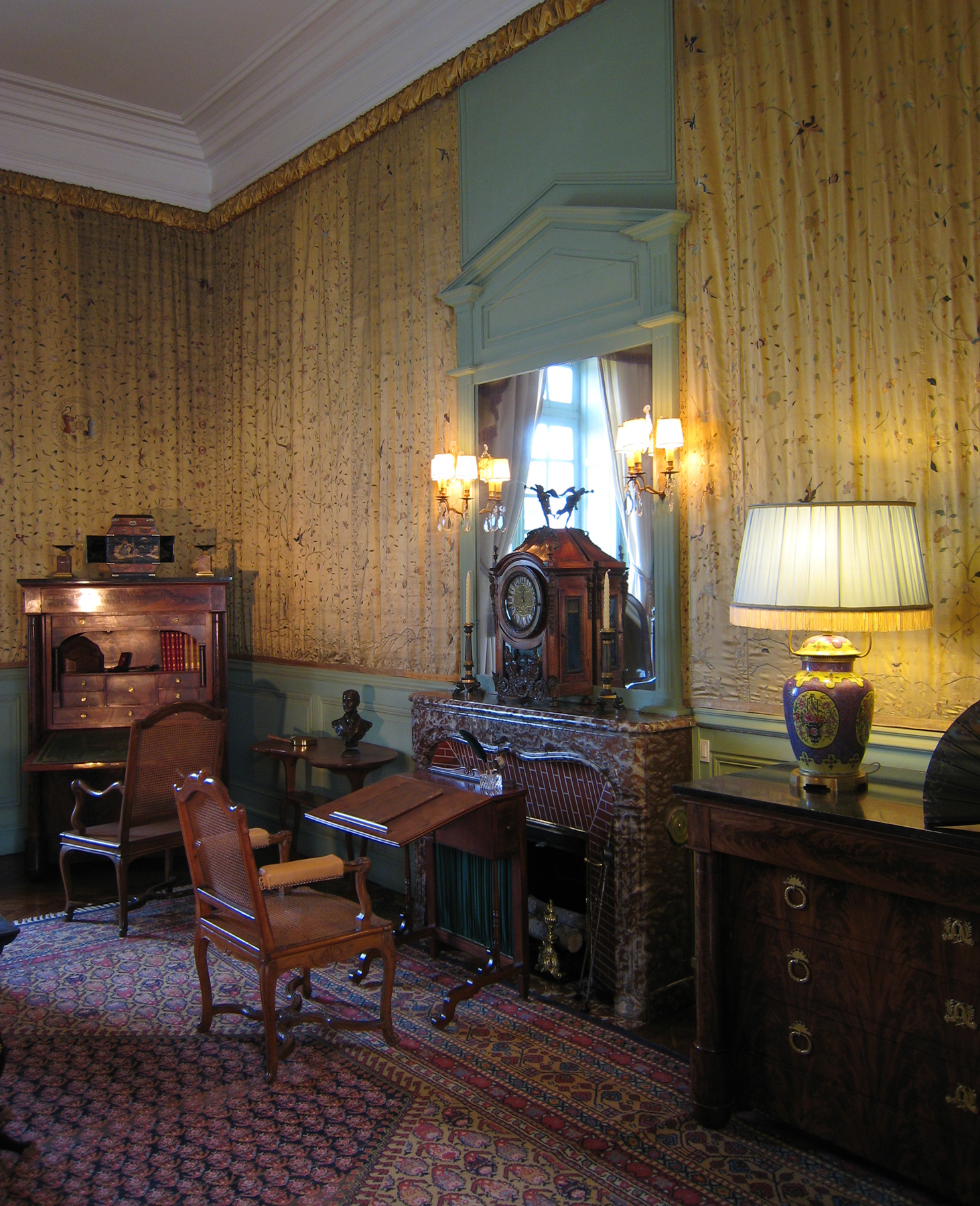 Château de Cheverny, Loir-et-Cher, France - small red boudoir